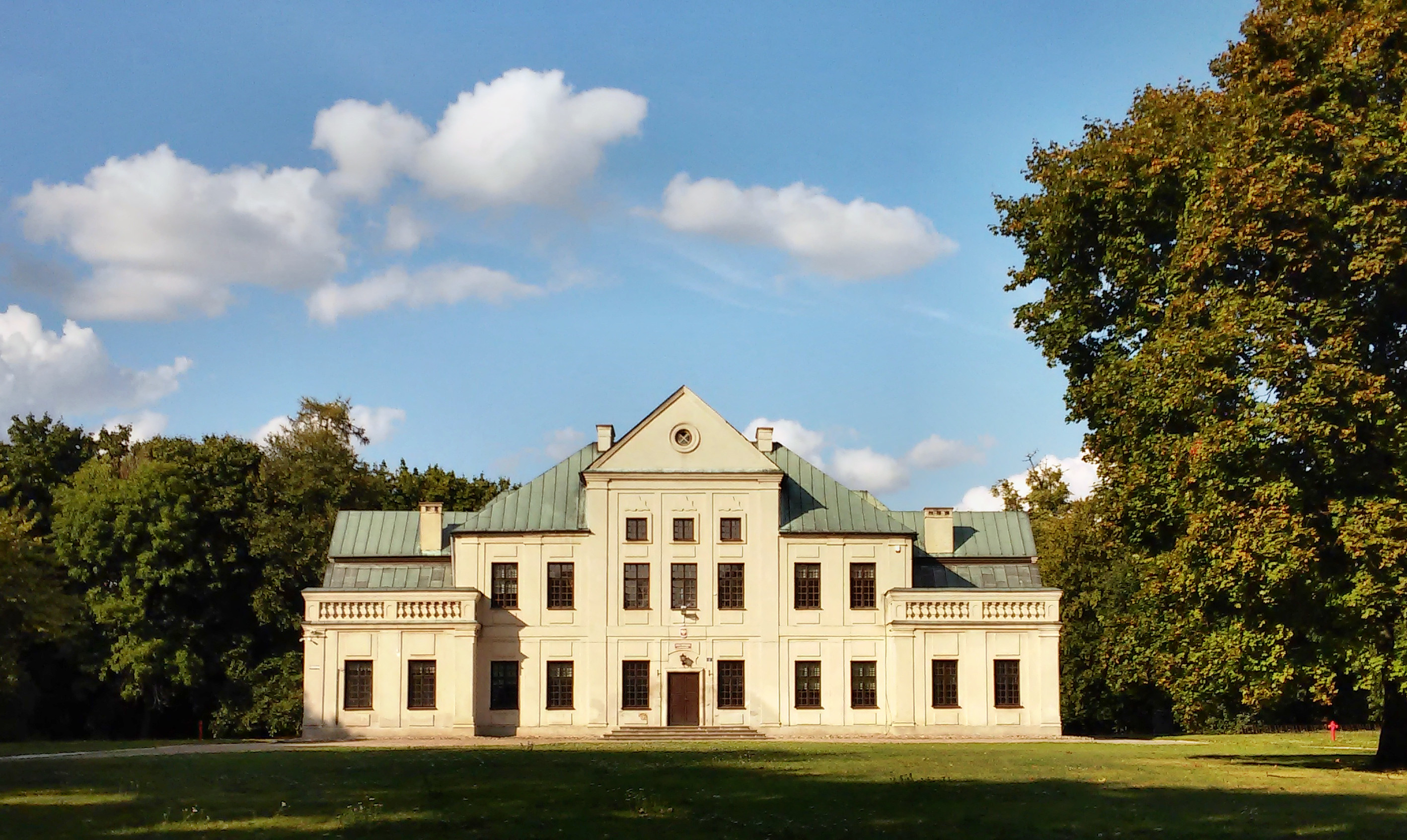 Srebrzyszcze, zespół pałacowy, kon. XVIII